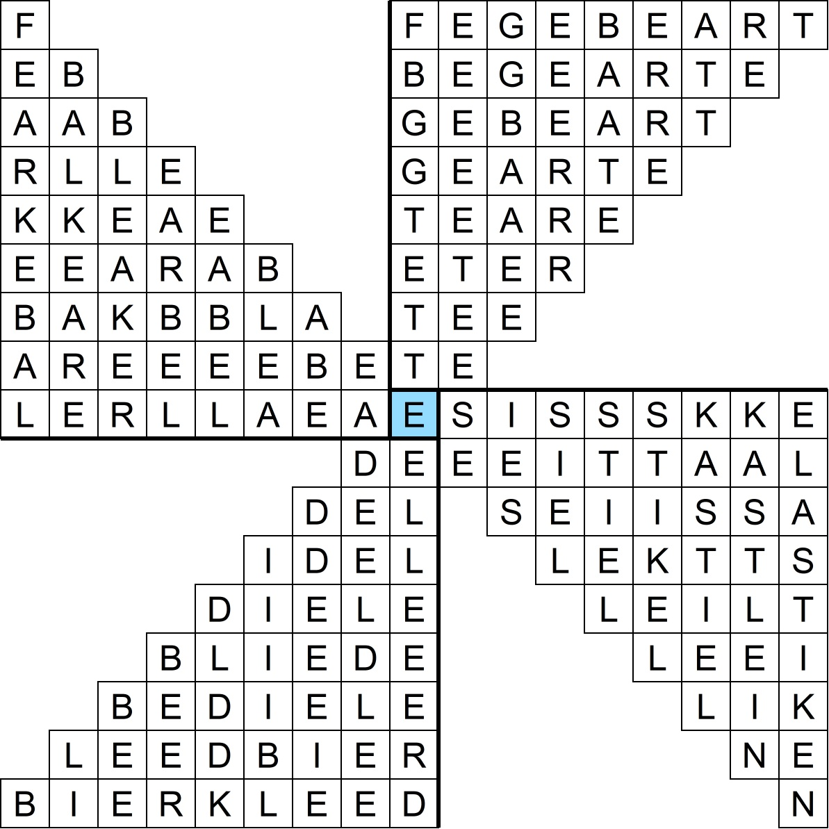 Een tjaskerpuzzel is een dubbele zandloperpuzzel